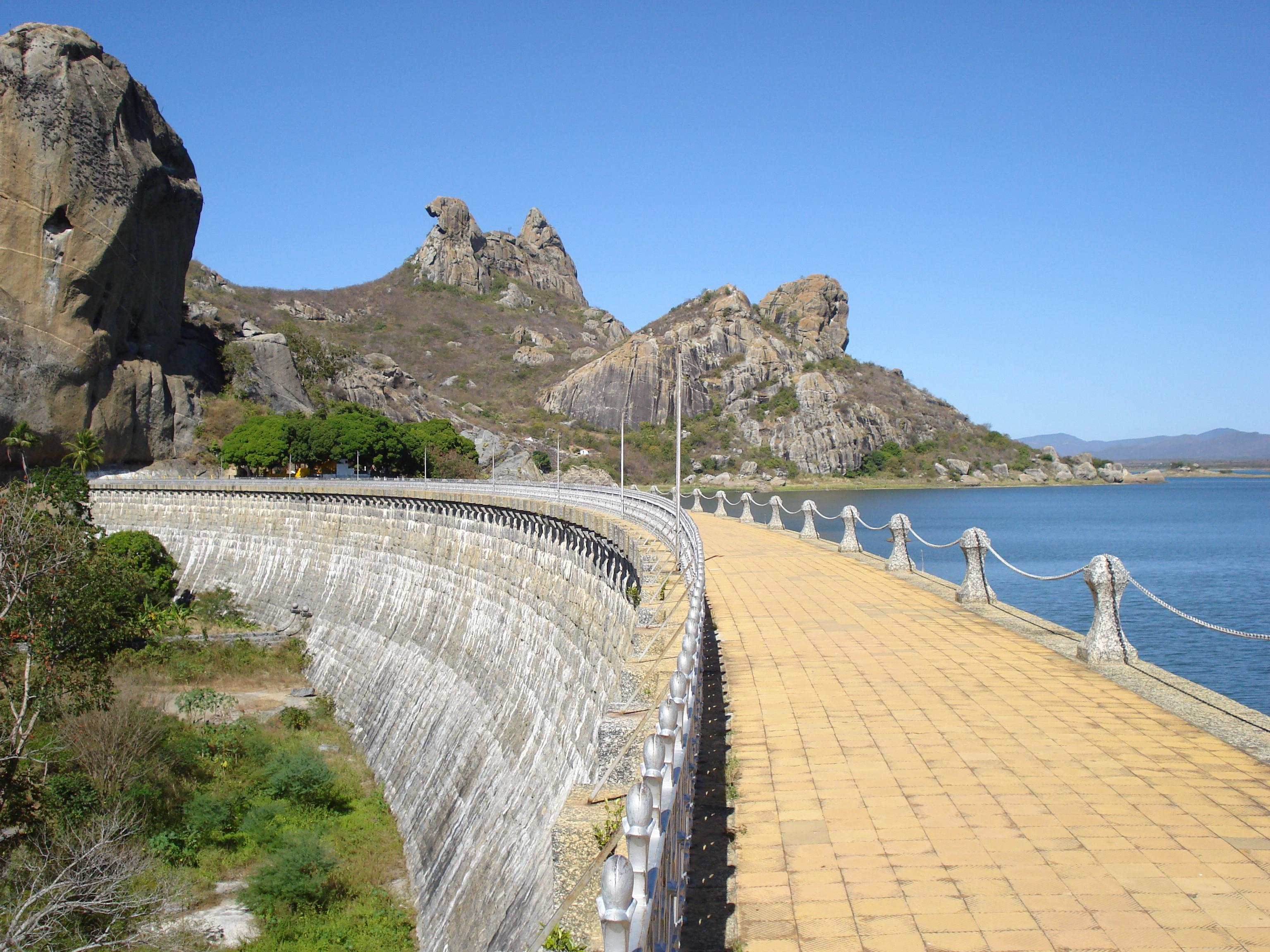 Parede principal do Açude do Cedro e Pedra da Galinha Choca, Quixadá, Ceará, Brasil.